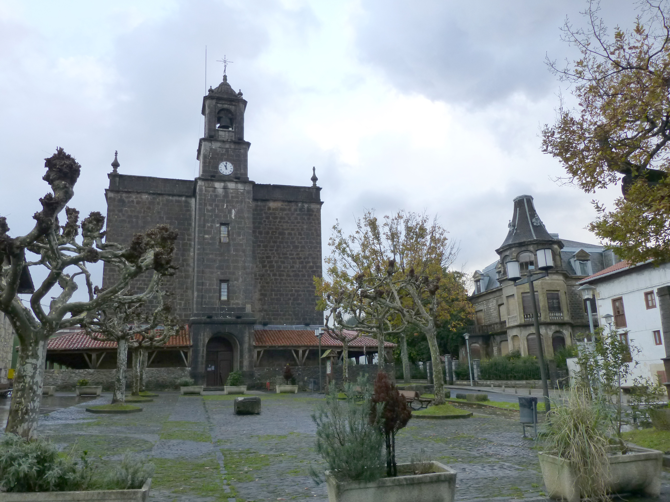 Iglesia de Ispaster (Bizkaia País Vasco España)